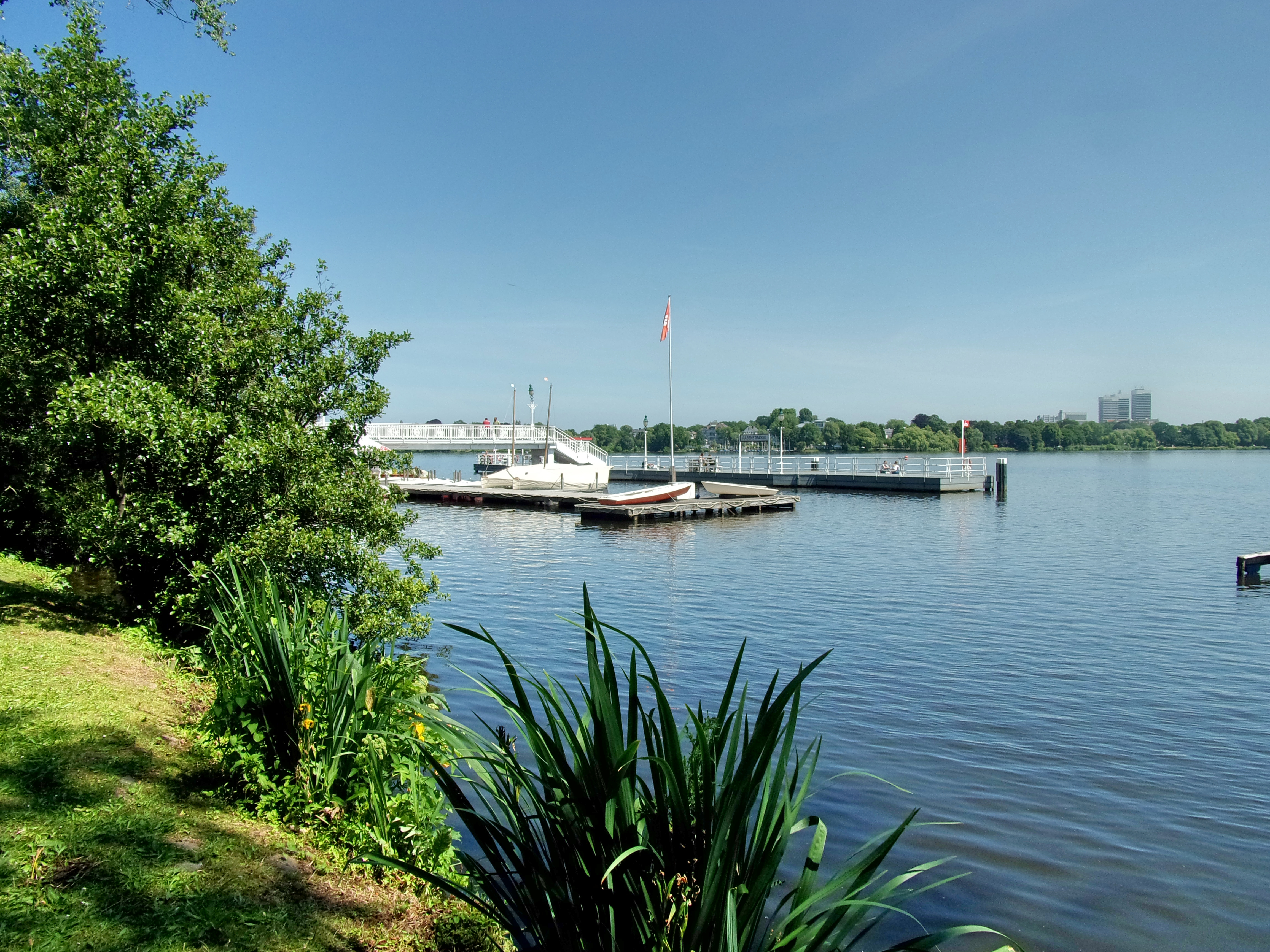 Anleger Rabenstraße der Alster-Touristik GmbH, Harvestehuder Weg Höhe Alte Rabenstraße. Brücke mit Ponton. Mehr zur Geschichte der Alsterschifffahrt unter dem folgendem Link: This is a photograph of an architectural monument.